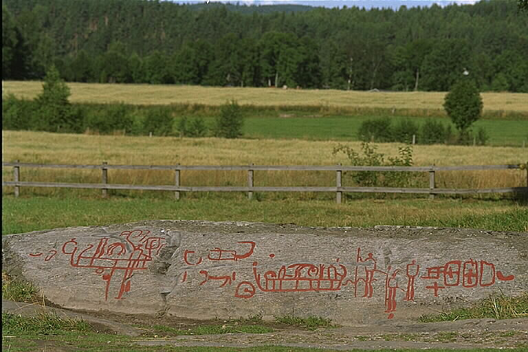 RAÄ-nummer Tisselskog 11:1. Processionshällen. Skepp med voltigörer, människofigurer och fotsulor. Motiv: Tisselskog 11:1 Nyckelord: Raä-Fastigheter, Riksintressen Kategori: Hällristning RAÄ-nummer Tisselskog 11:1. Processionshällen. Skepp med voltigörer, människofigurer och fotsulor. Tisselskog 11:1.